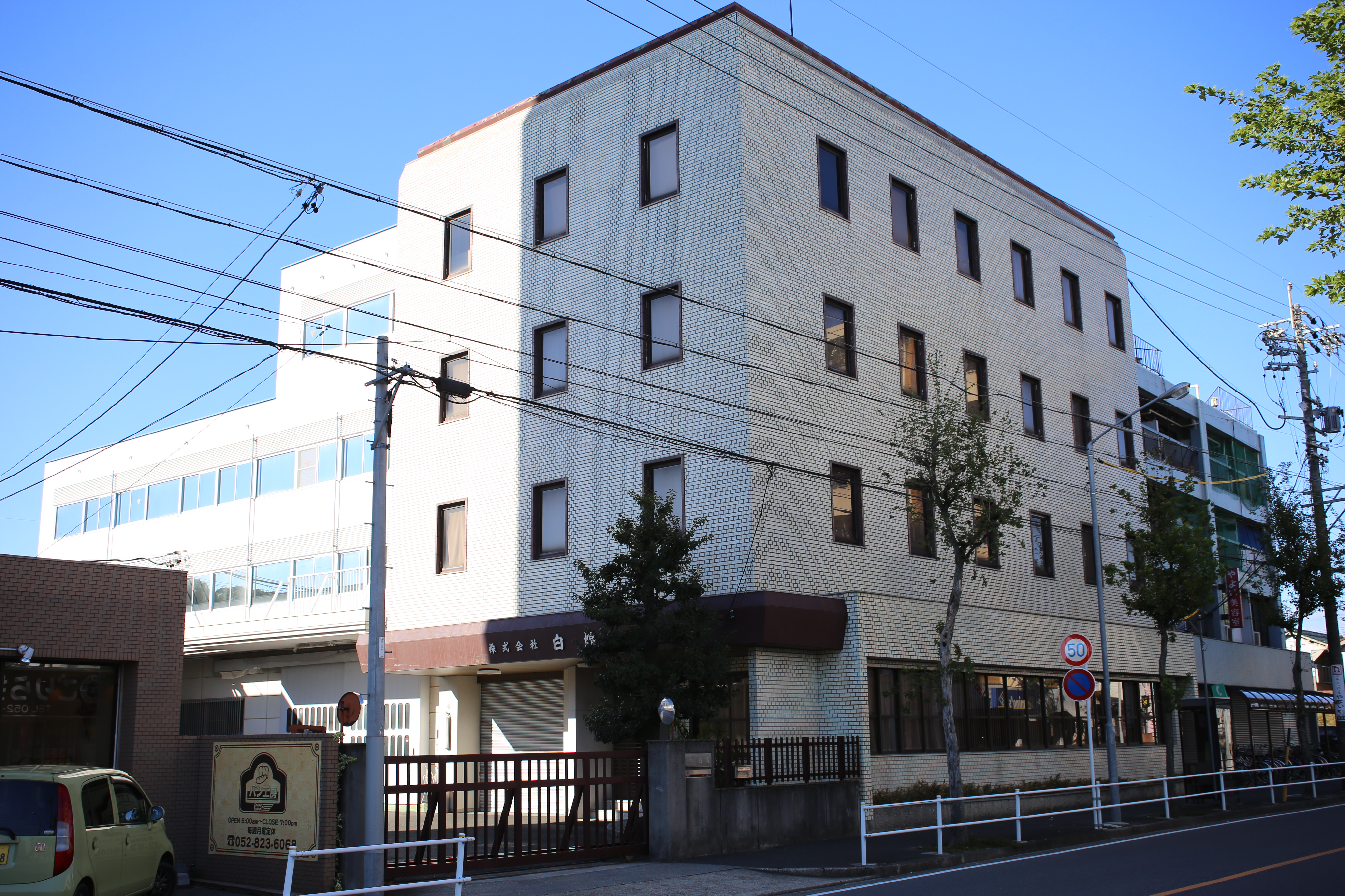 名古屋市南区弥生町の白鳩本社を東側公道南側より撮影